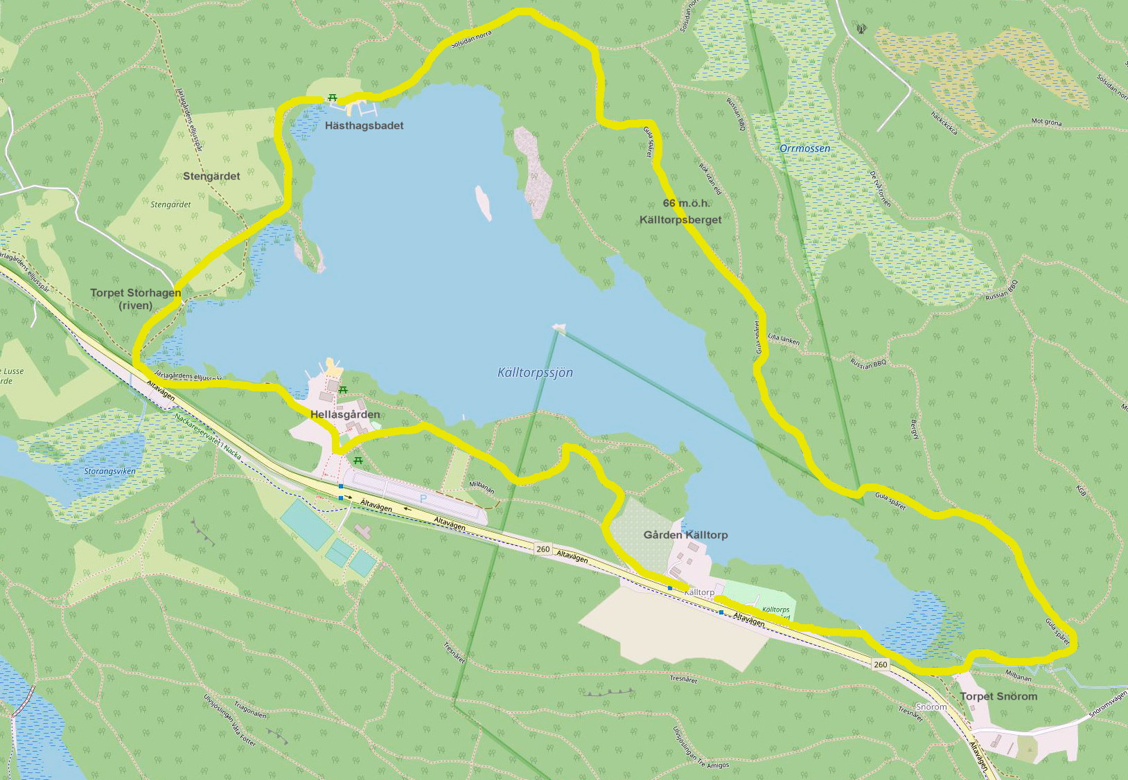 Källtorpssjön runt på gula spåret. Karta: Open Street map Förklaringar: Holger Ellgaard